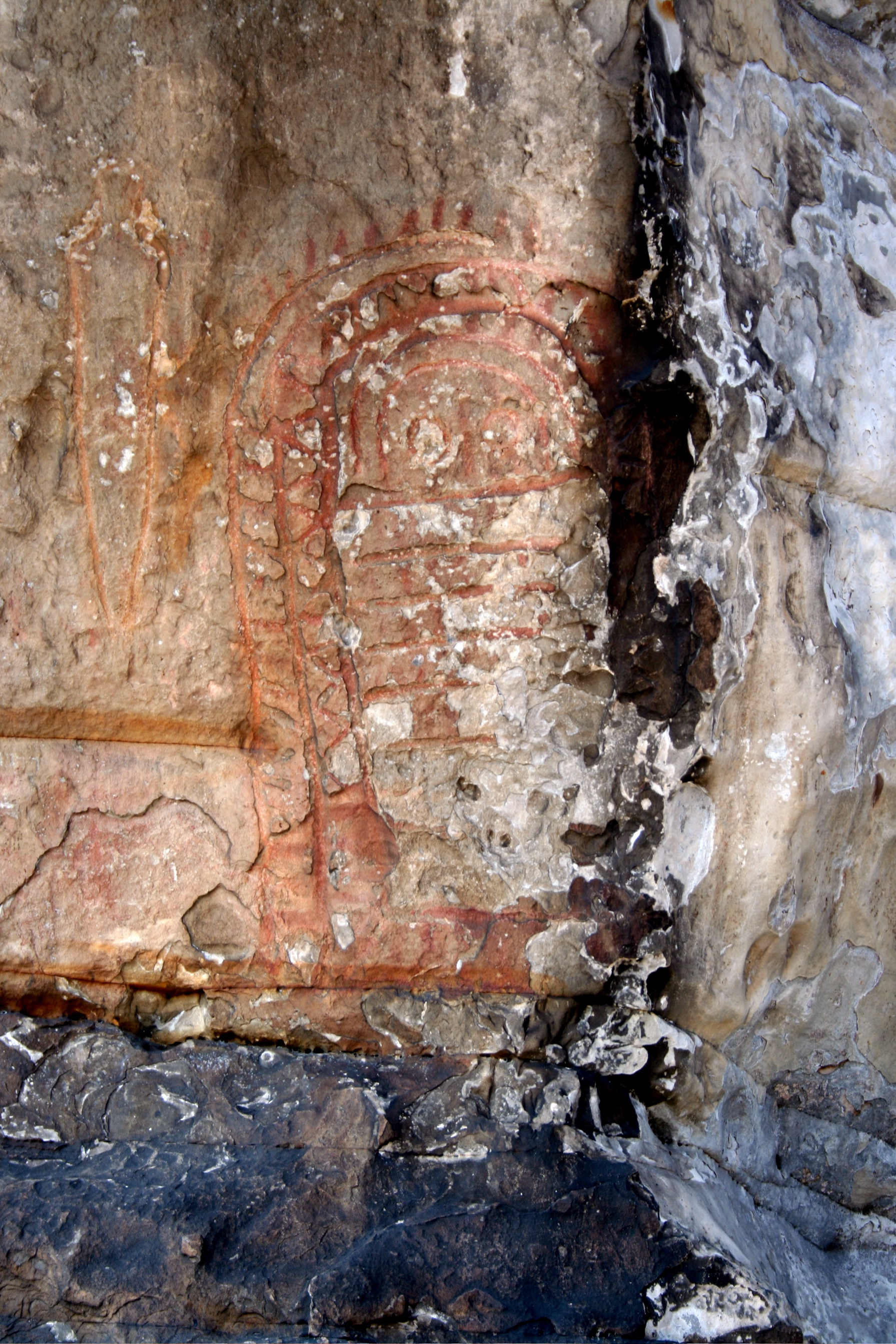 Detalle del ídolo de Peña Tú